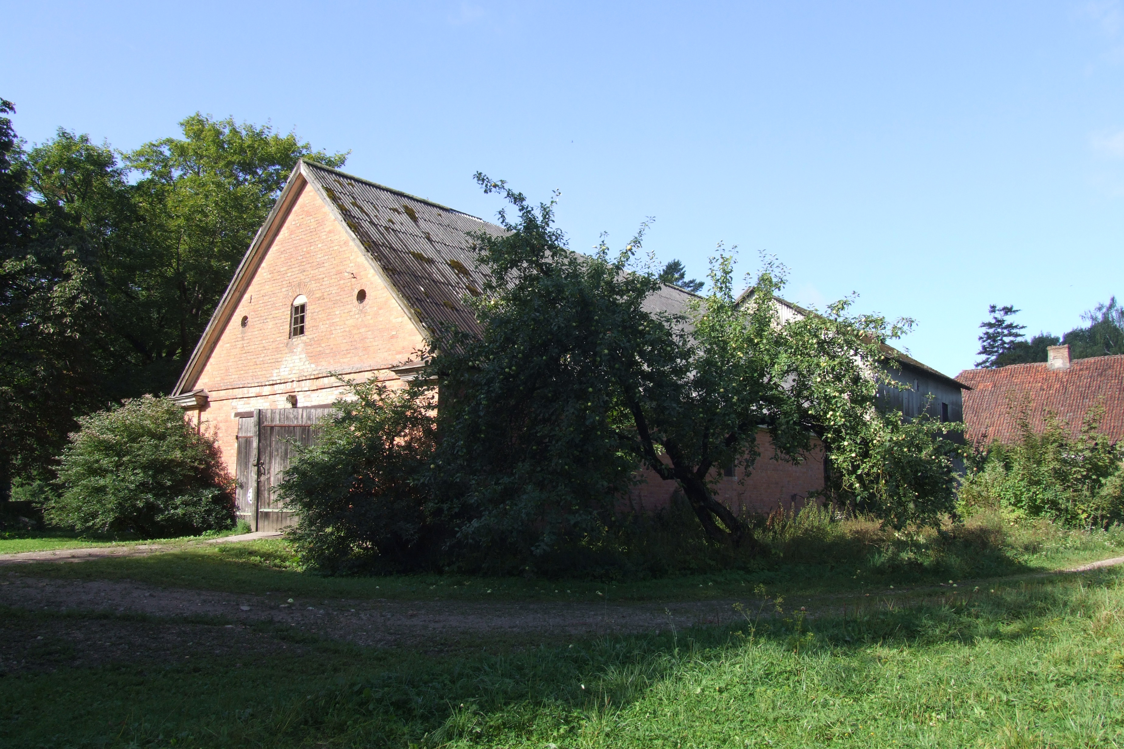 Skursteņmuižas saimniecības ēkas, 11.08.2013.